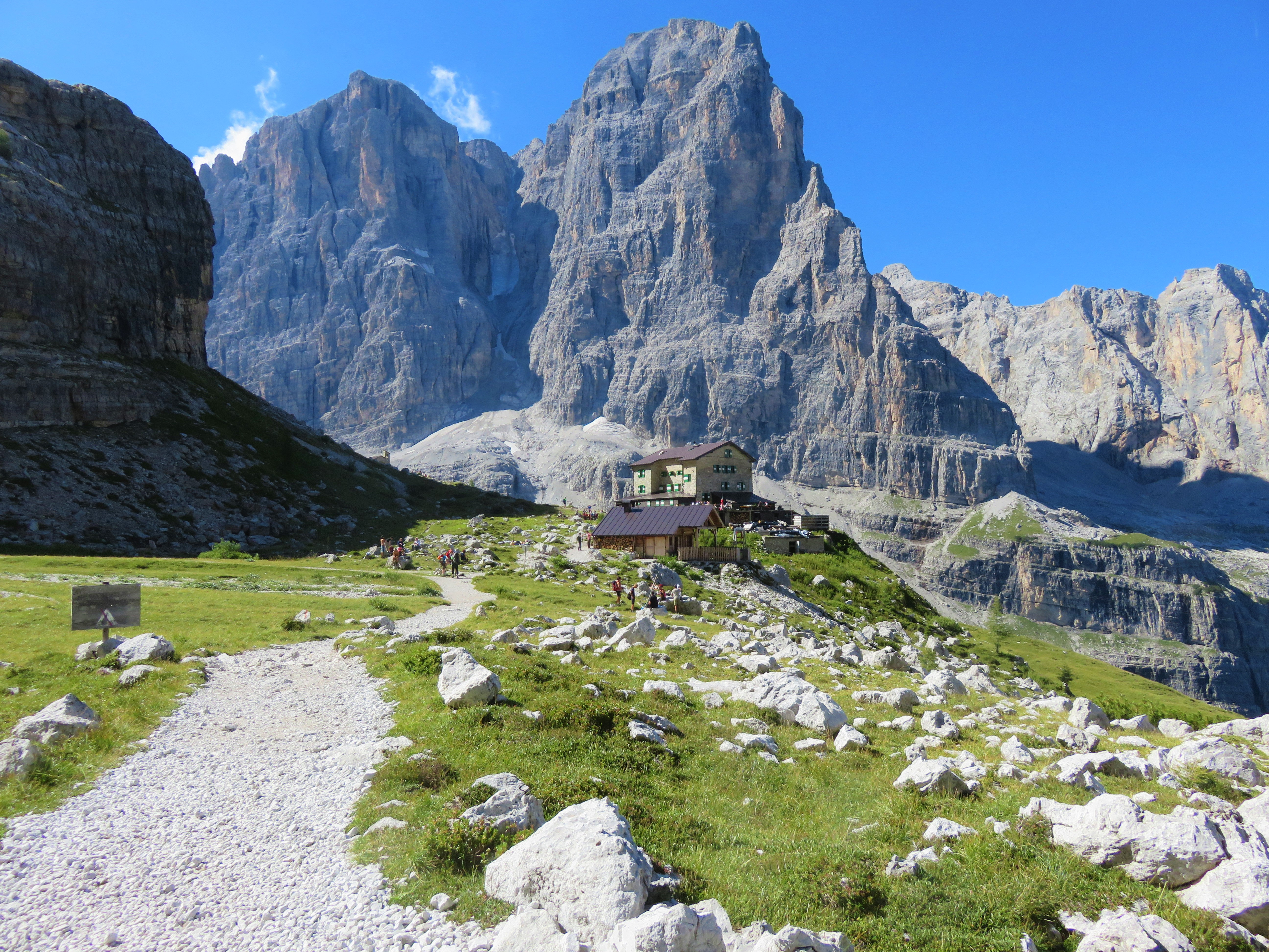 Rifugio Brentei. Vista dal basso.